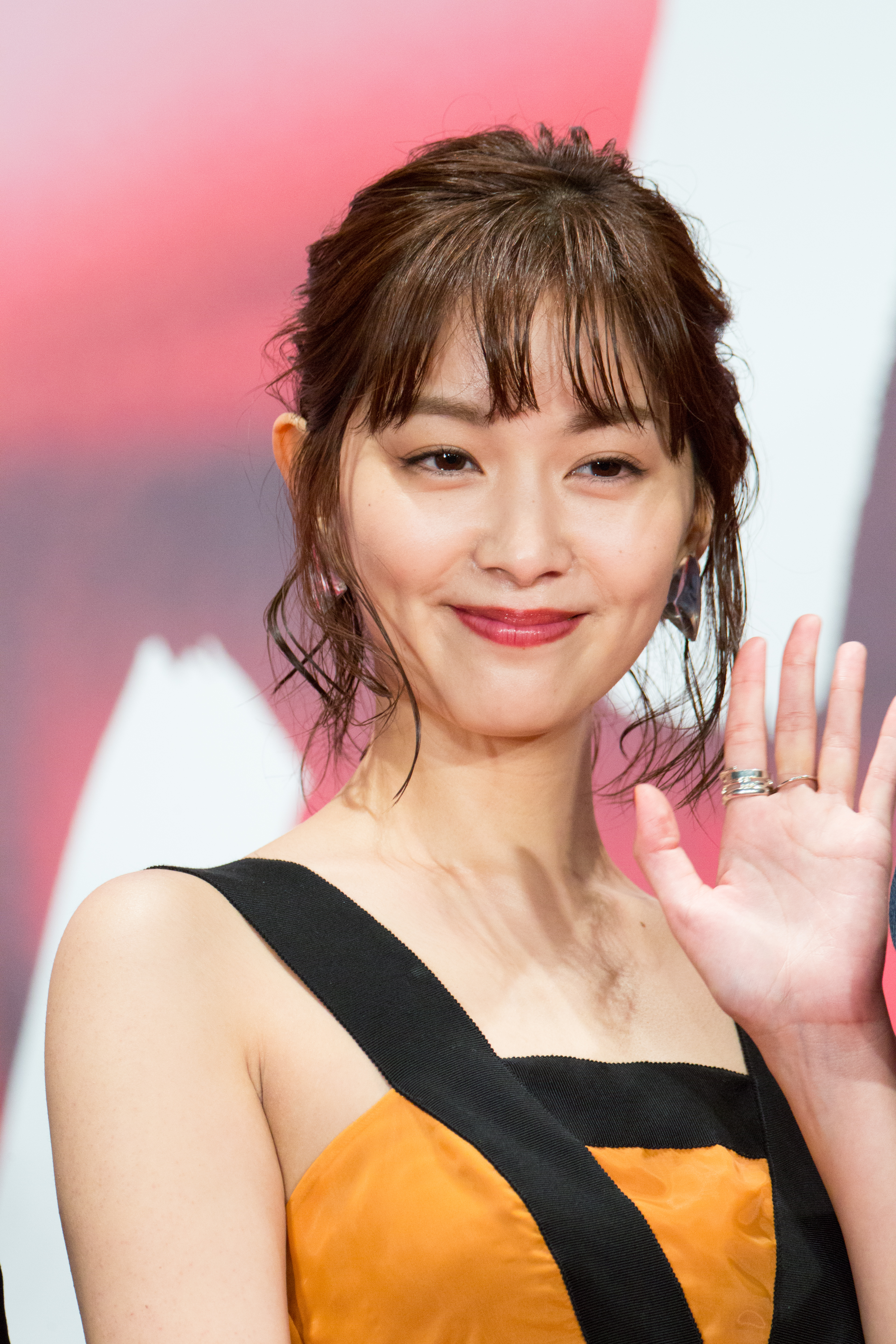 第30回 東京国際映画祭 オープニングセレモニー 石橋杏奈 (勝手にふるえてろ)